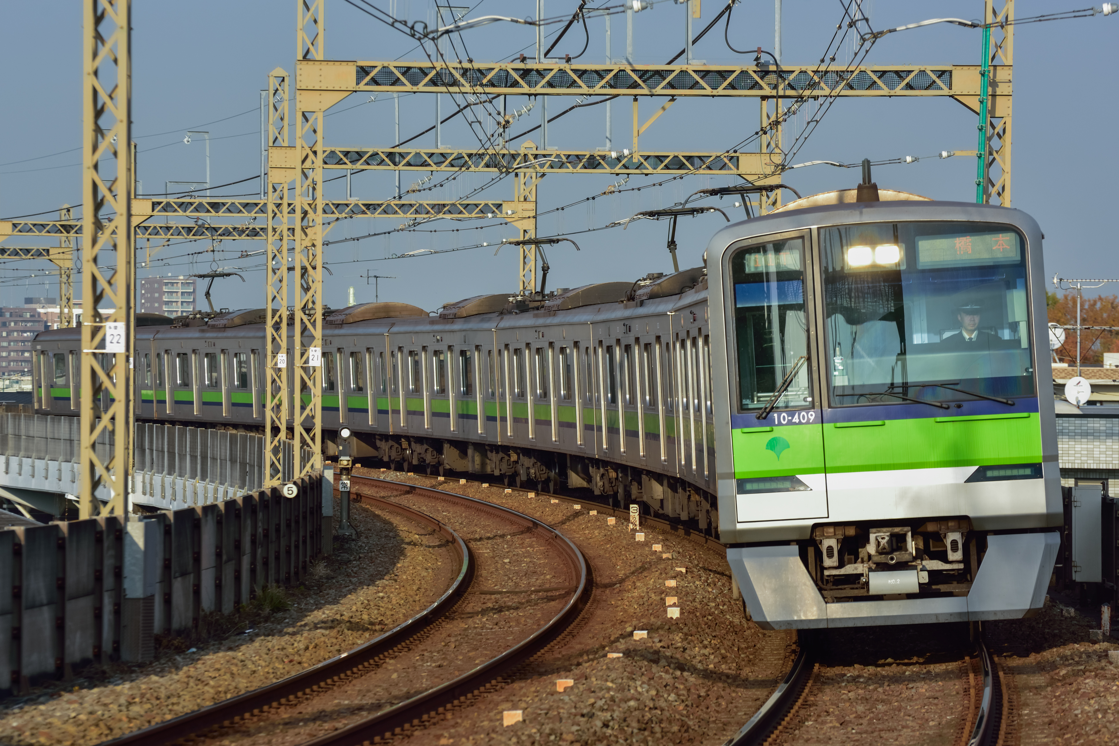 都営地下鉄10-300形。京王稲田堤駅にて.